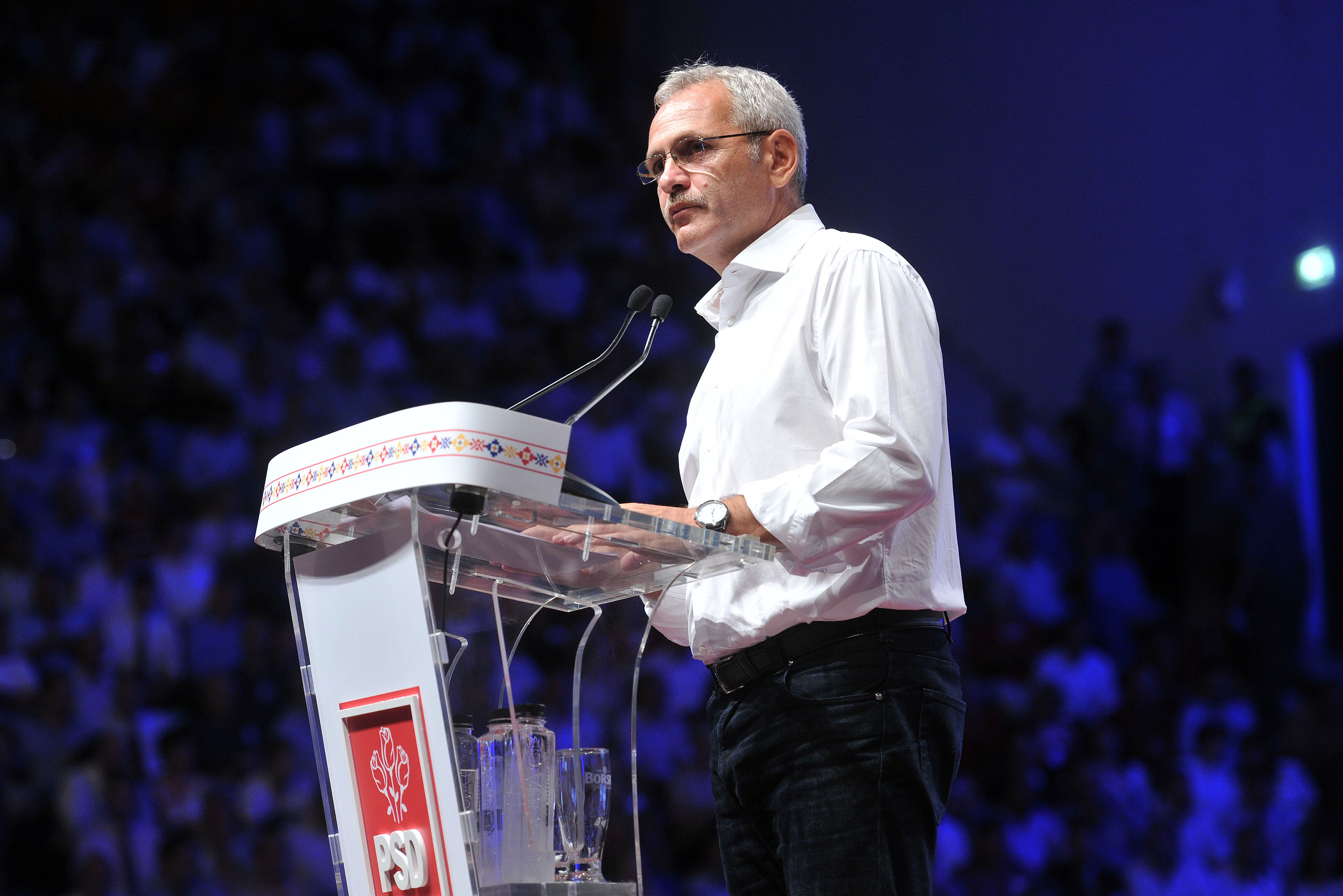 Consiliul National al PSD, Craiova - 30.07 (1)